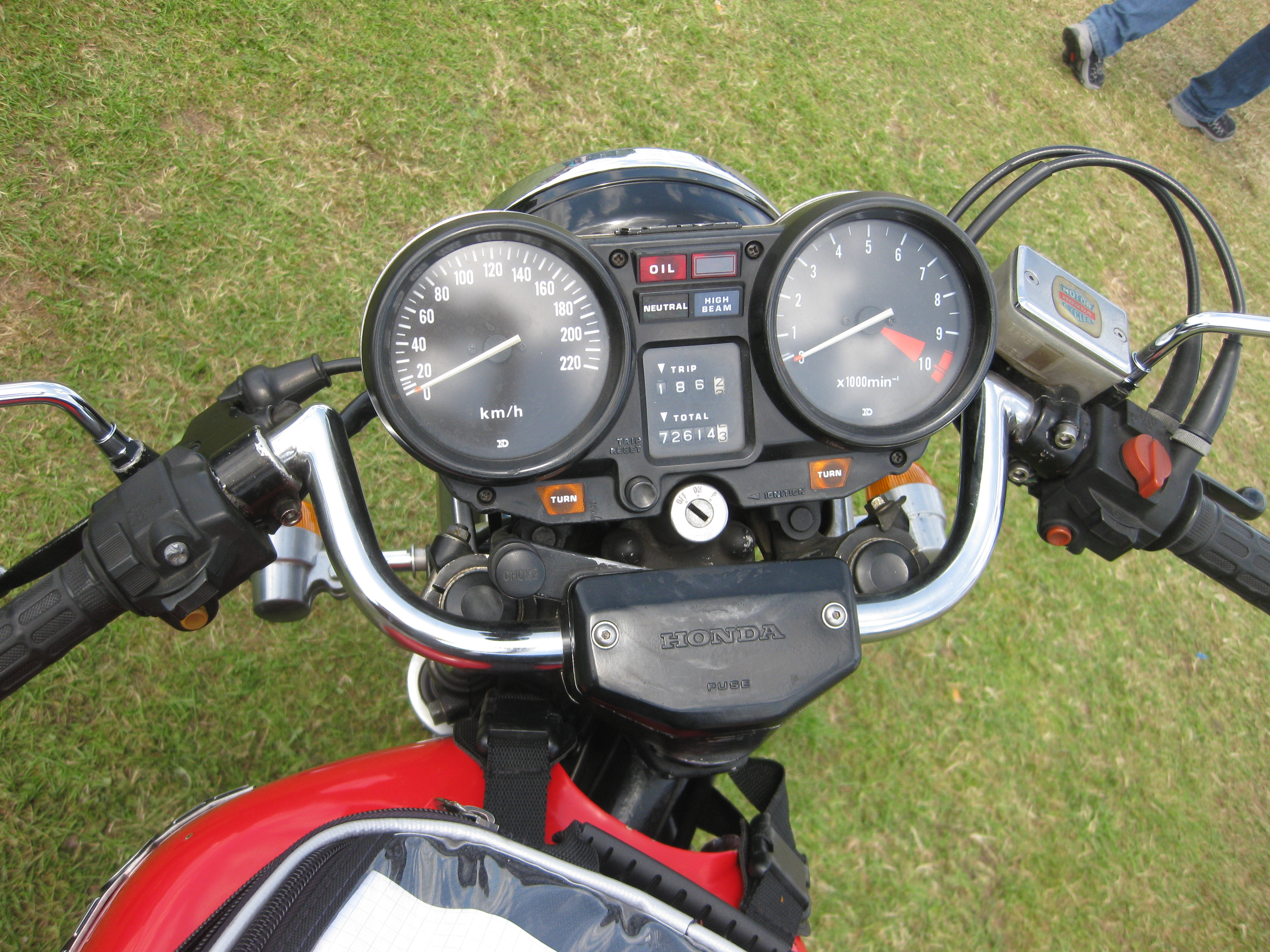 Honda CB750K Cockpit